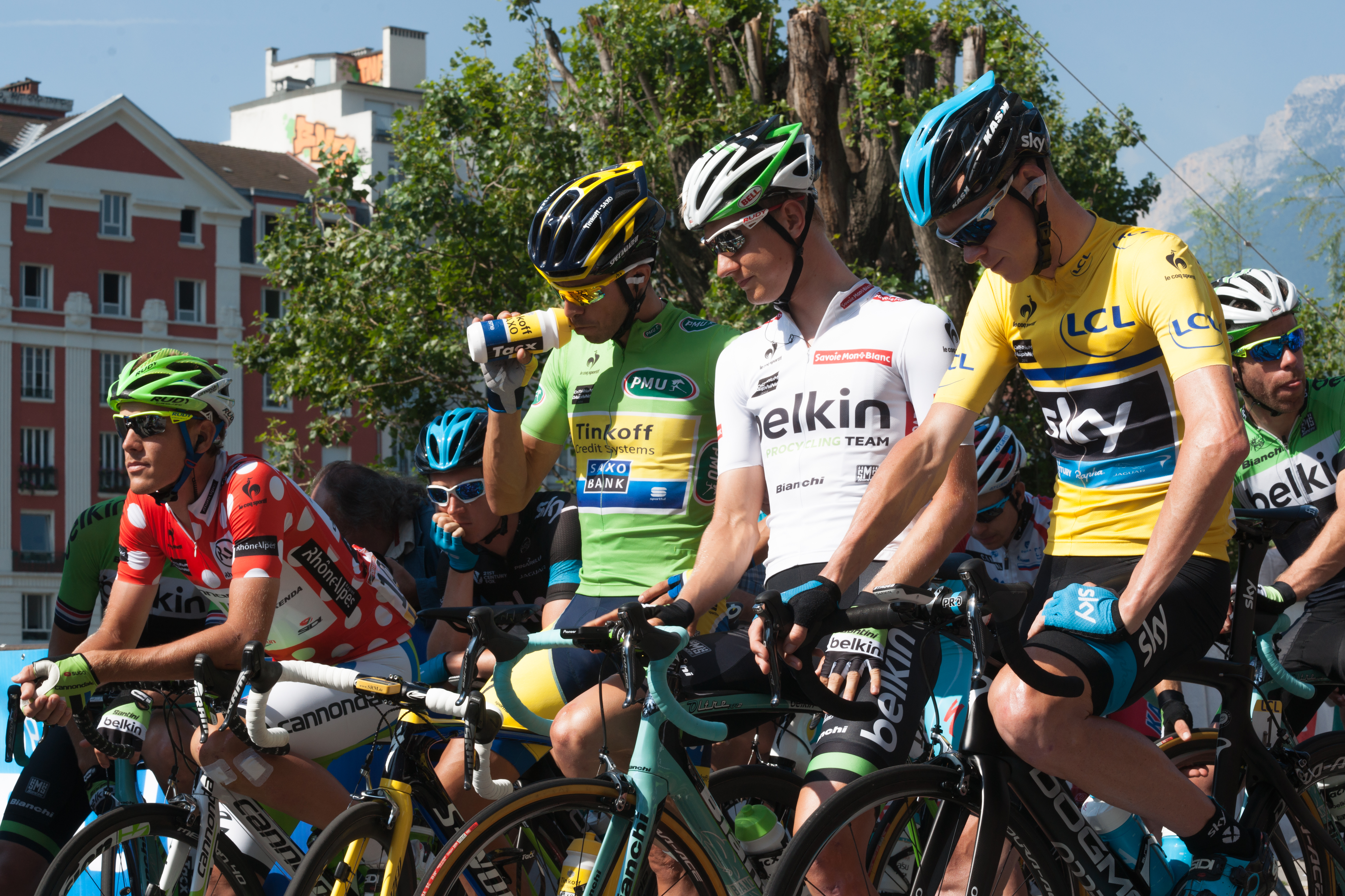 Critérium du Dauphiné 2014 - Etape 6 - départ maillots de leaders